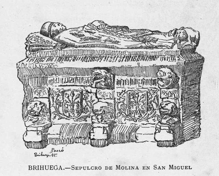 Sepulcro de Molina en San Miguel, en Brihuega.